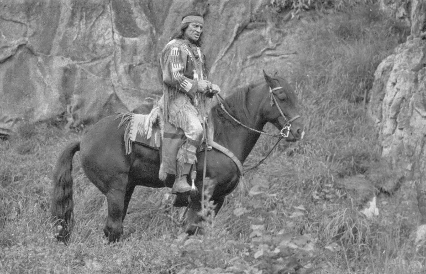 Piere Brice als Winnetou, Karl-May-Festspiele Elspe